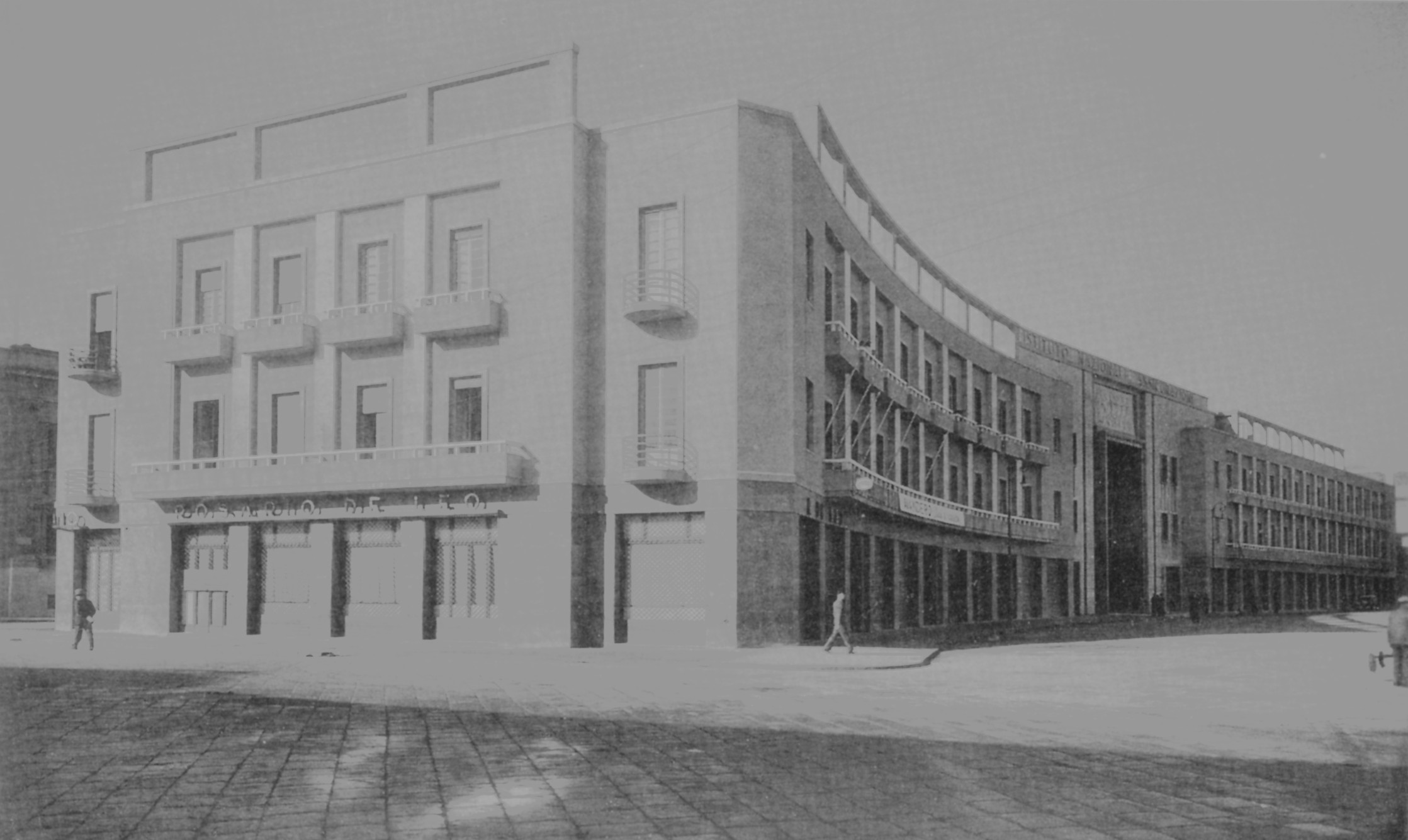 Palazzo dell'INA(Giuseppe Samonà)